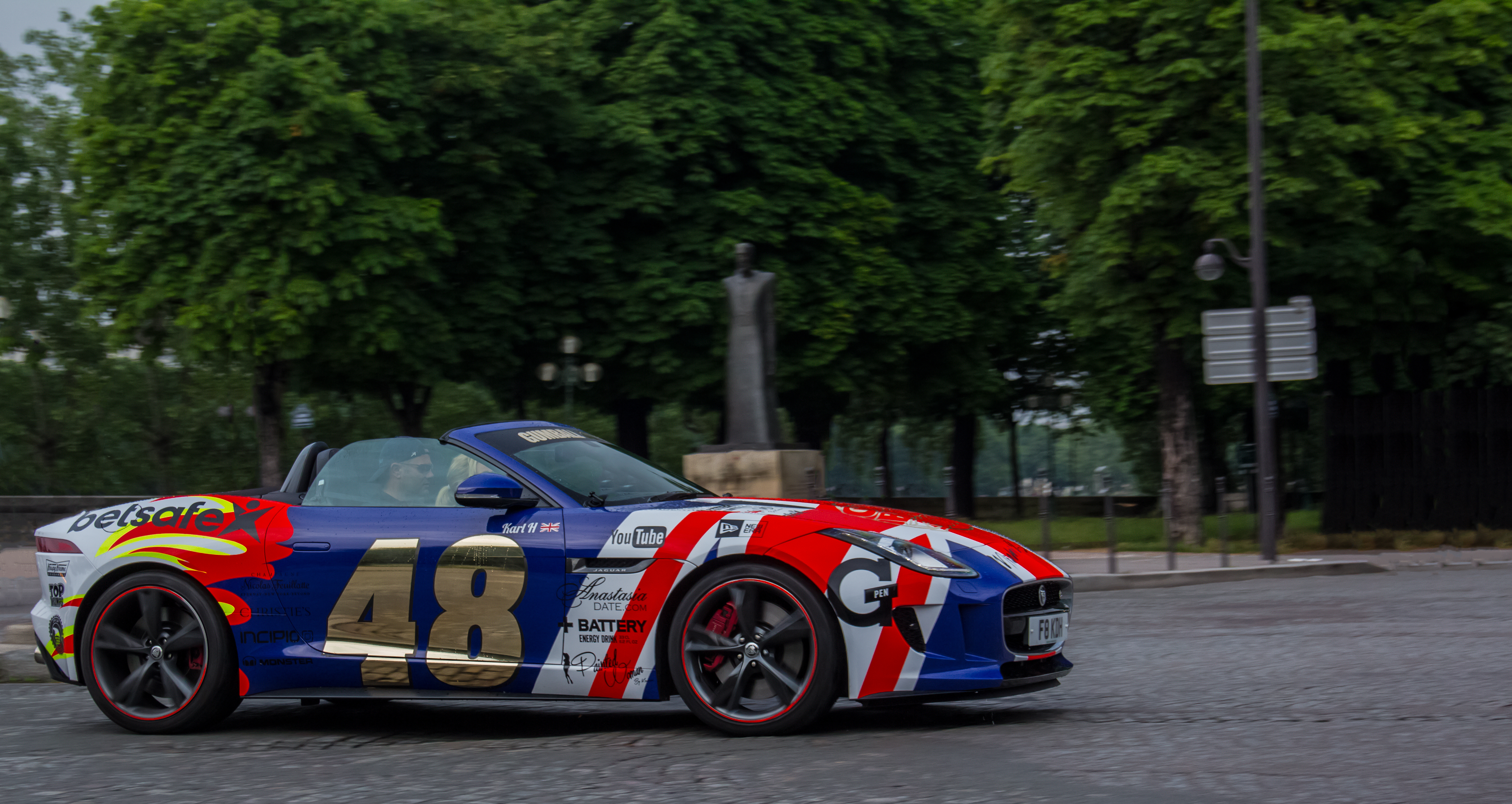 jaguar F Type